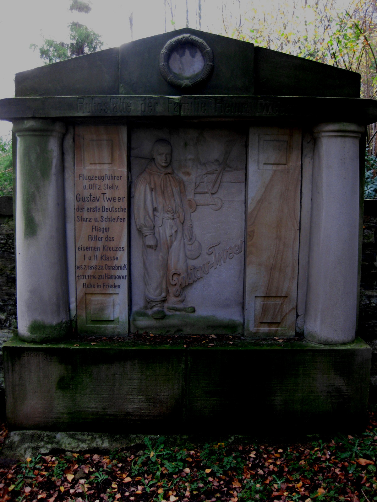 Grabmal des Piloten Gustav Tweer und der Familie Tweer auf dem Johannisfriedhof in Osnabrück